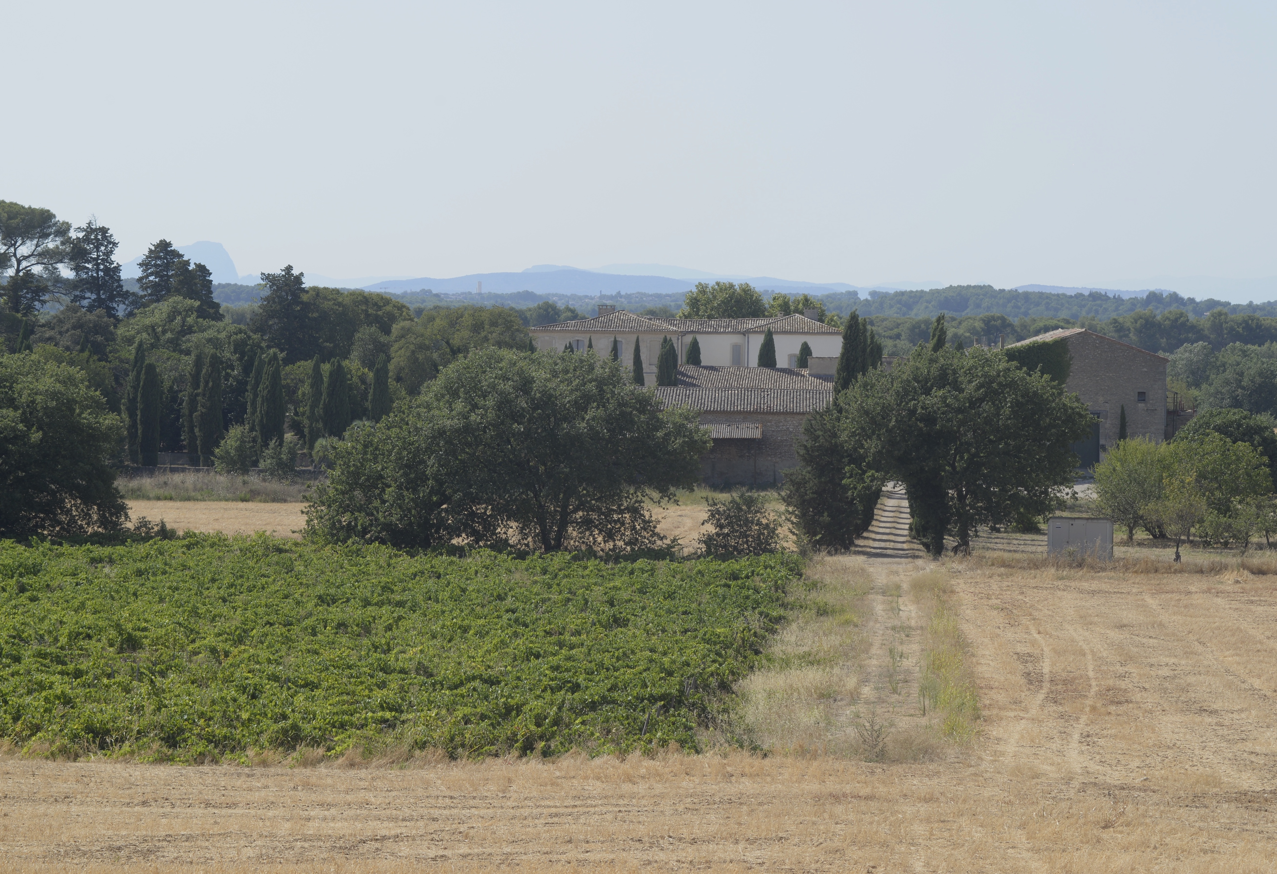 Château de la Devèze, vigne et champ de pois chiches